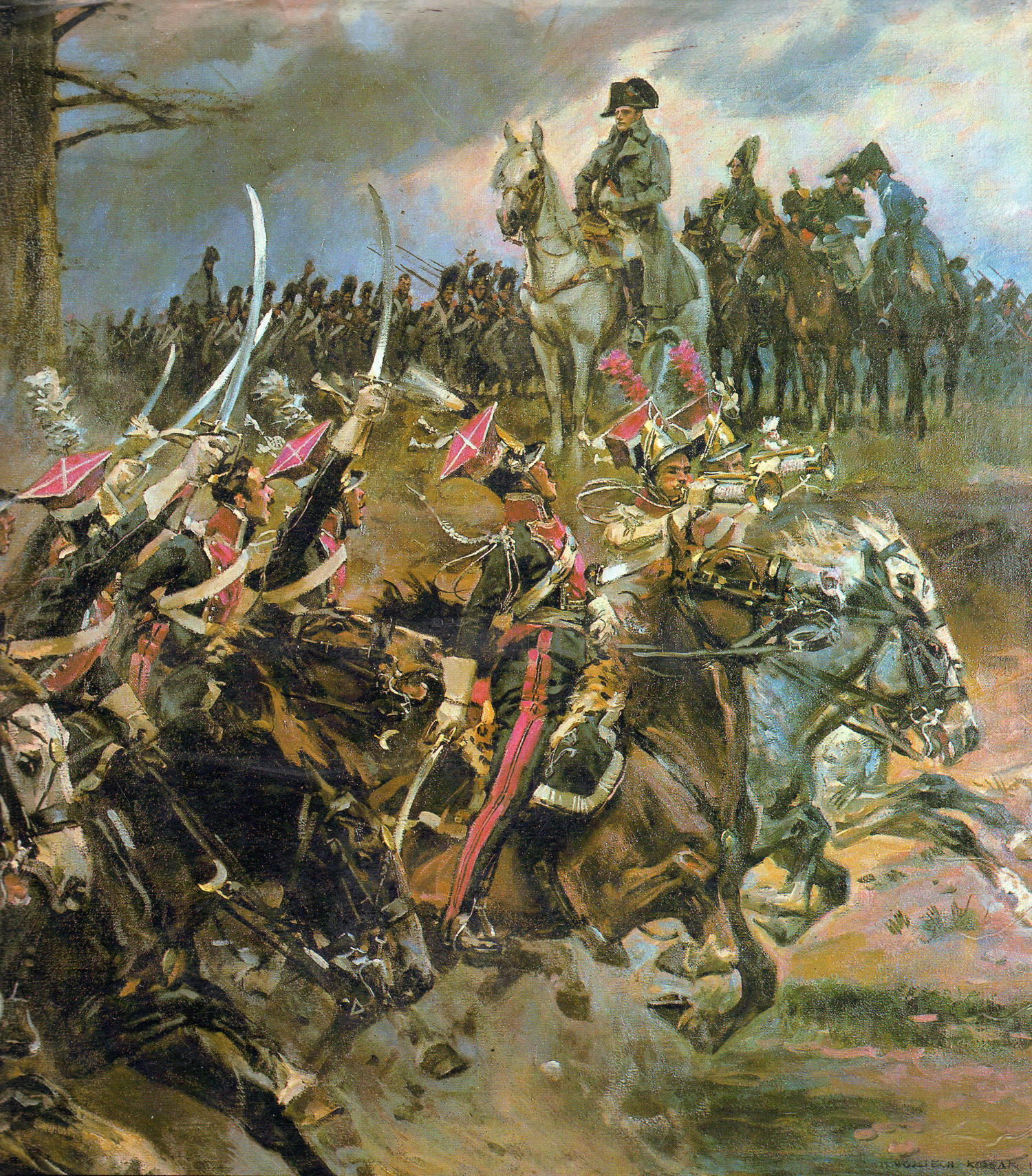 Niech żyje cesarz! Vive l'Empereur! (Apothéose de Napoleon)